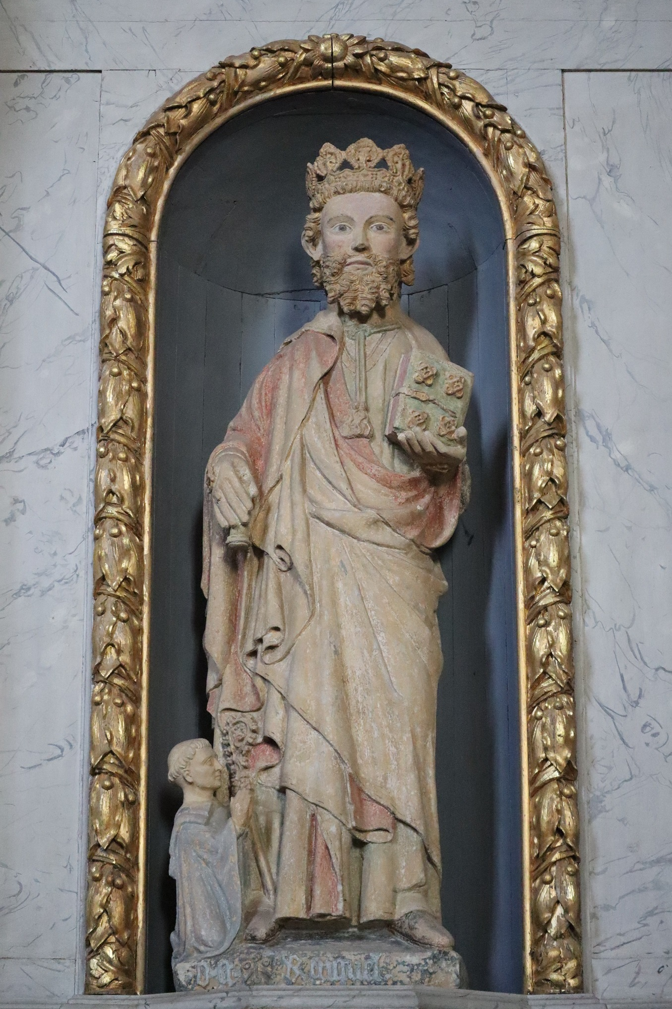 Statue de Saint-Judicaël en l'abbatiale Notre-Dame de Paimpont (35).